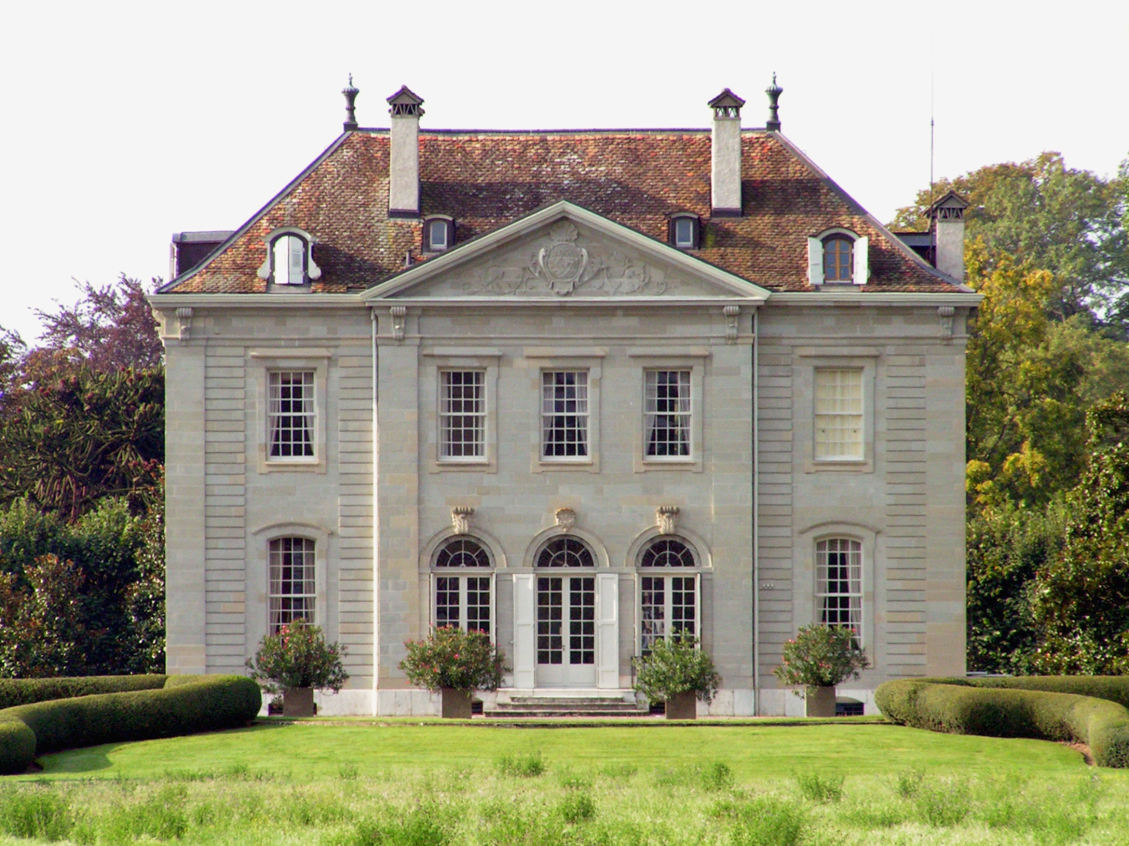 Route du Creux-de-Genthod 19, Genthod. Campagne du Creux-de-Genthod.